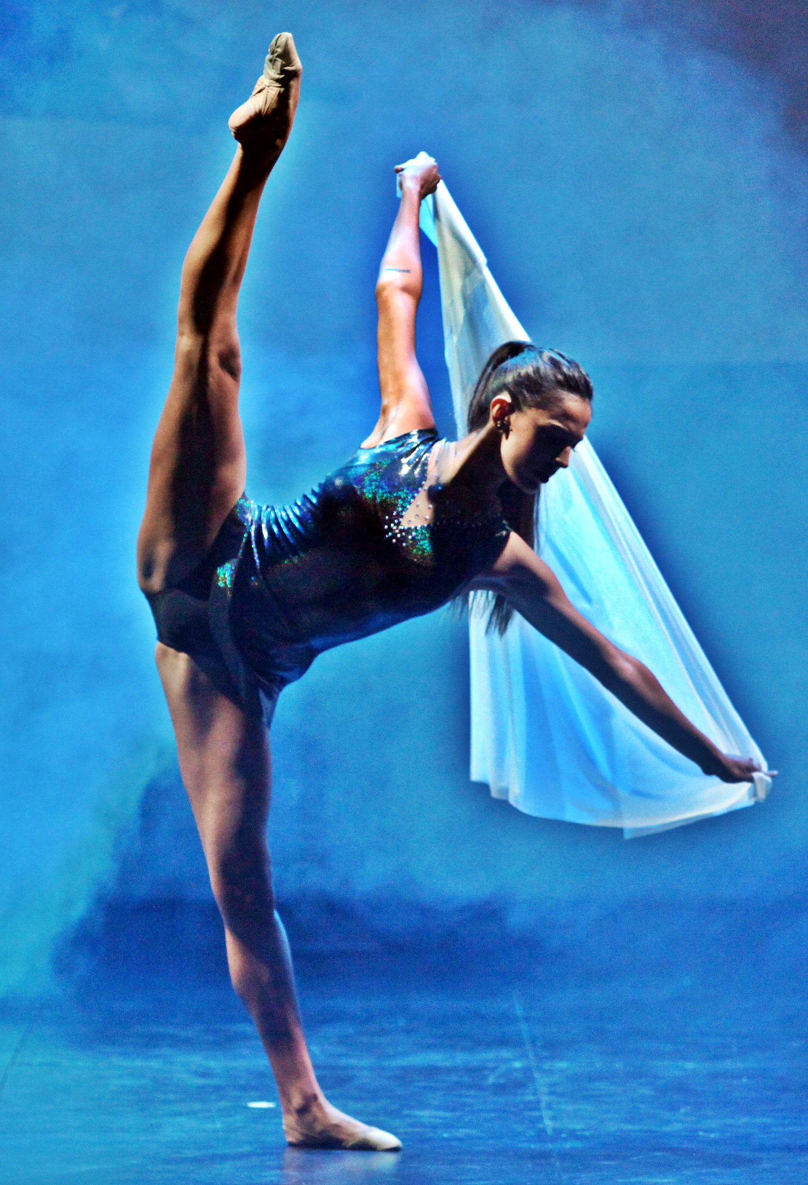 Actuación de la gimnasta rítmica Marina Fernández en la 61 Festa de l'esport en Sabadell el 24 de abril de 2014.